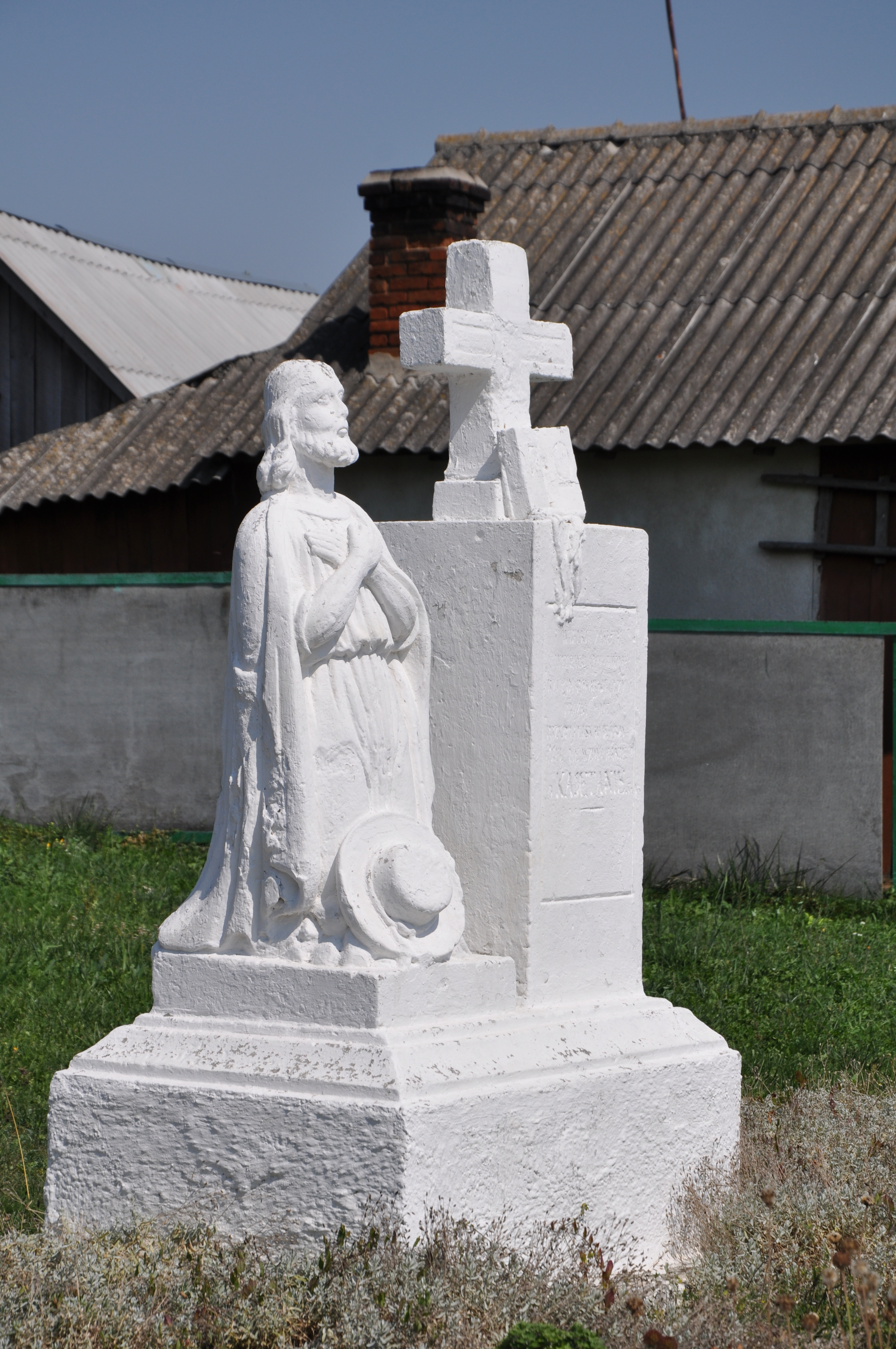 Фігура на території православного храму в селі Шманьківчики Чортківського району Тернопільської області України.